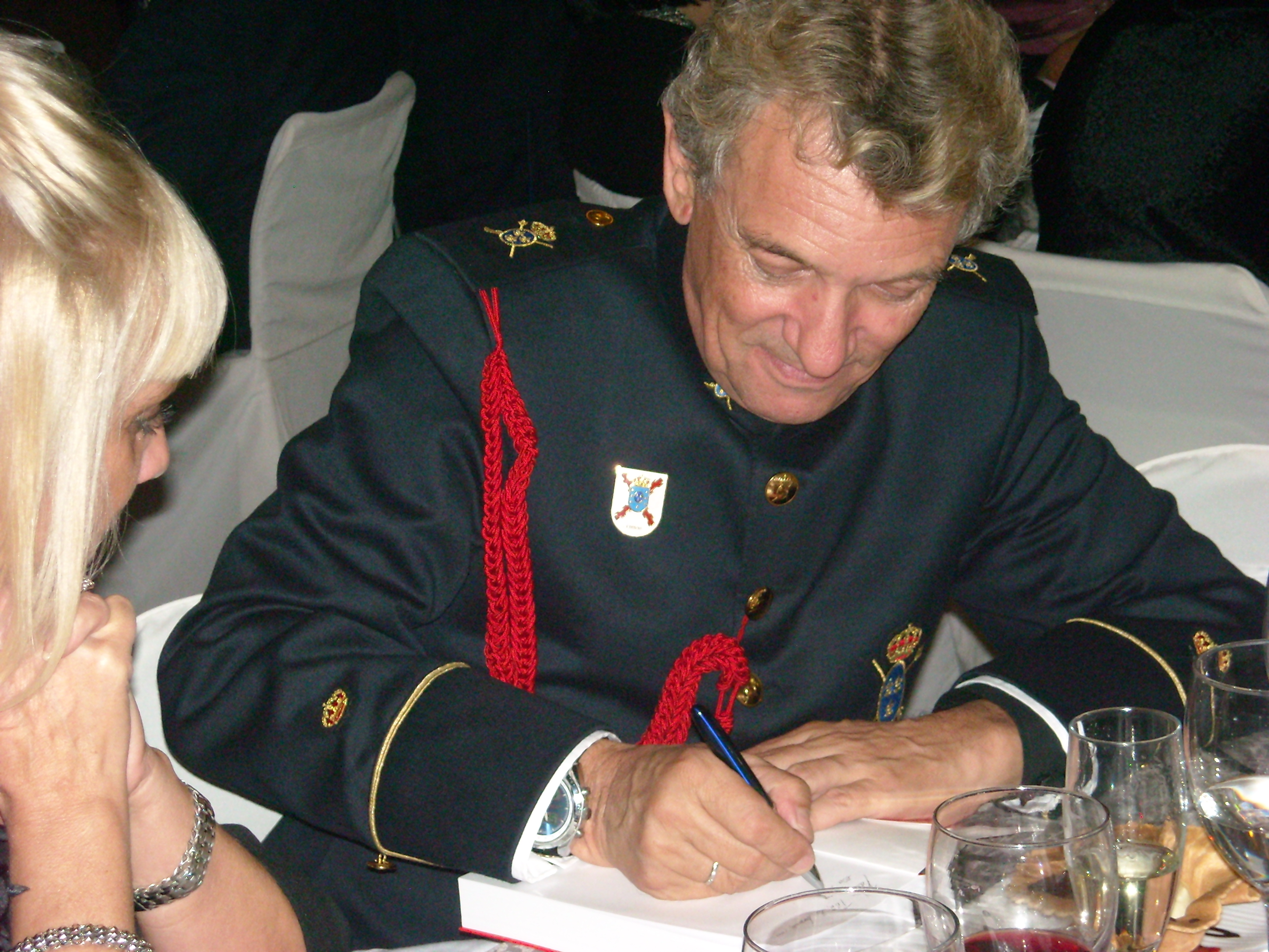 José S. ISBERT firmando libros